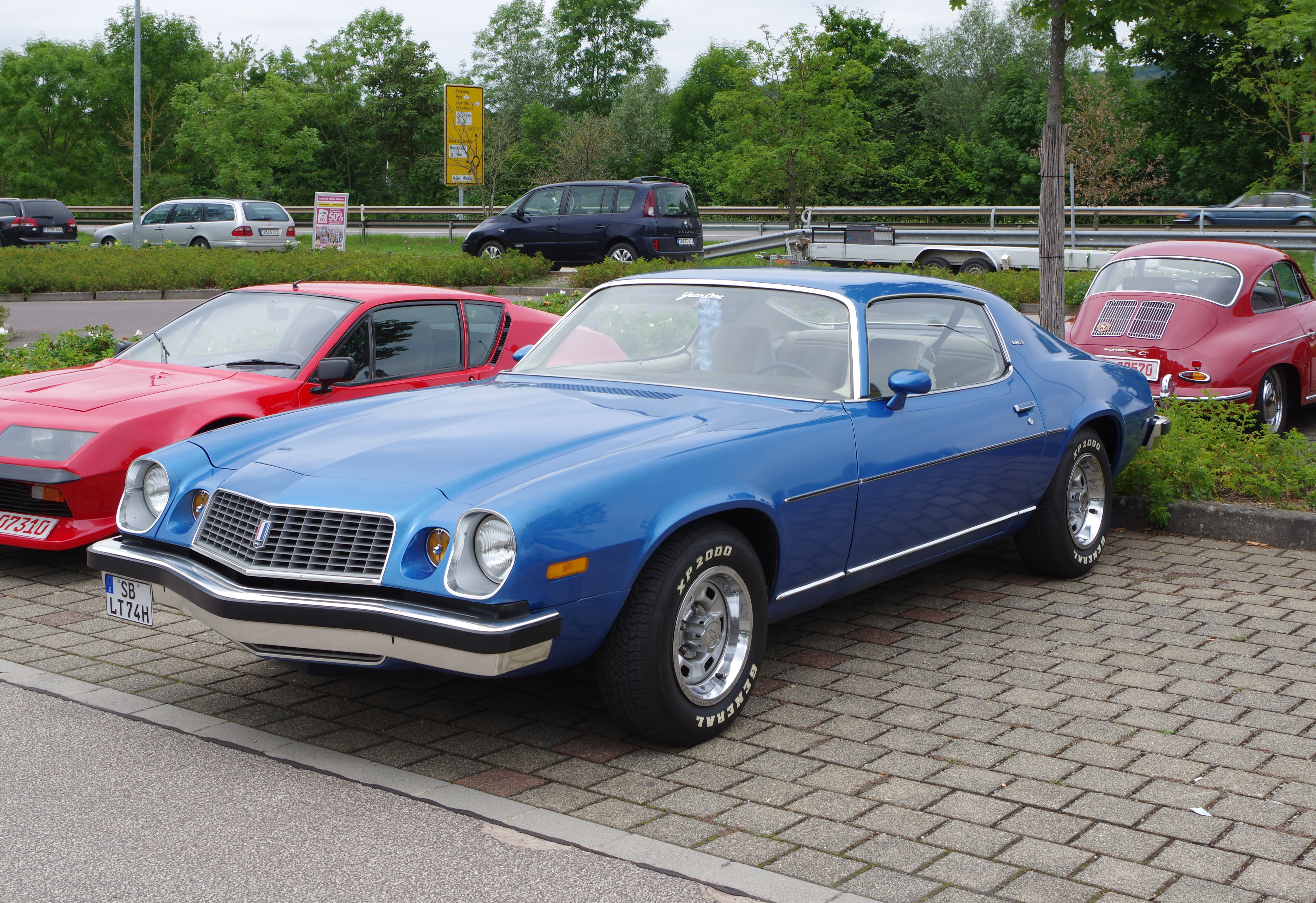 Chevrolet Camaro, 1974